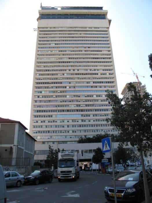 המבנה רב קומות הראשון בתל אביב